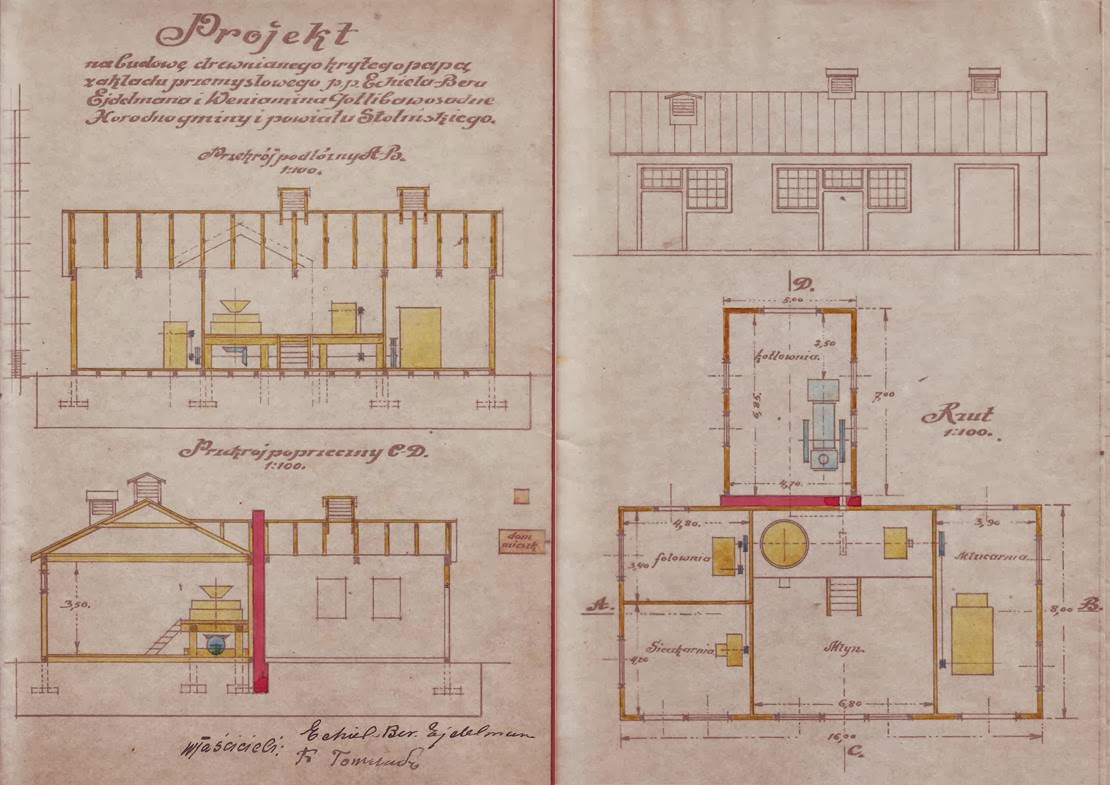 Беларуская (тарашкевіца): Гарадная (Haradnaja). Праект будынака супольнага прадпрыемства Эхіэль-Бэра Эйдэльмана (Echiel-Ber Ejdelman) і Вэніяміна Готліба (Weniamin Gotlib)